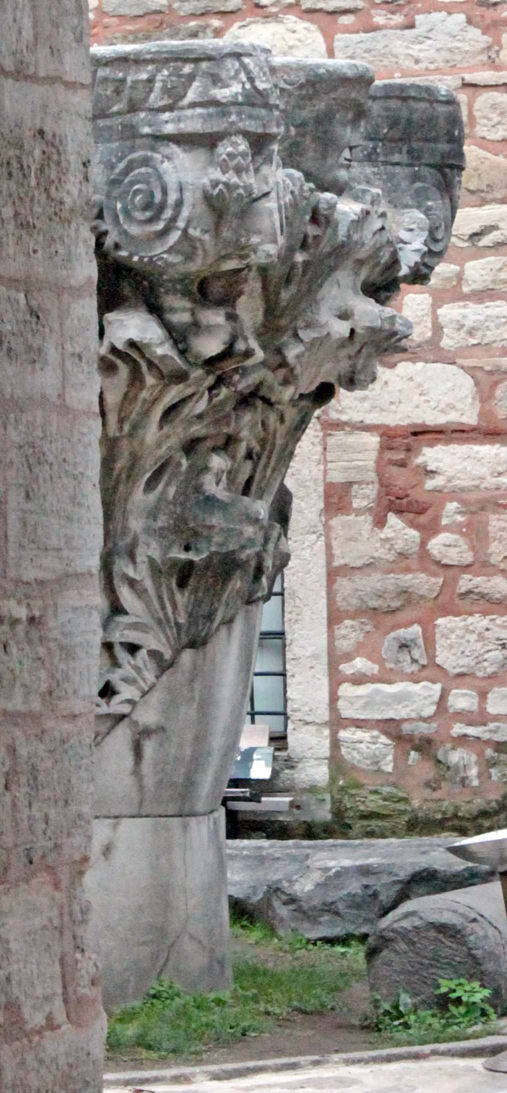 Capitello corinzio bizantino con maschera di acanto, di dimensioni colossali, attribuito alla colonna di Leone e conservato in un piccolo cortile annesso al secondo cortile del Topkapı Sarayı, suo luogo di ritrovamento. Il capitello, insieme alla corrispondente imposta che lo sormontava (vedi File:TopkapiSarayi-SecondoCortile-ColonnaLeoneImposta.jpg e File:TopkapiSarayi-SecondoCortile-ColonnaLeoneImpostaBis.jpg) e ad uno dei rocchi del fusto (vedi File:TopkapiSarayi-SecondoCortile-ColonnaLeoneFusto.jpg) è attribuito alla colonna eretta dall'imperatore Leone I il Trace nel suo Foro omonimo (Ken R. Dark, Anthea L. Harris, "The Last Roman Forum: the Forum of Leo in Fifth-century Constantinople", in Greek, Roman and Byzantine Studies, 48, 2008, p.60; ricostruzione della colonna di Leone sul sito .)